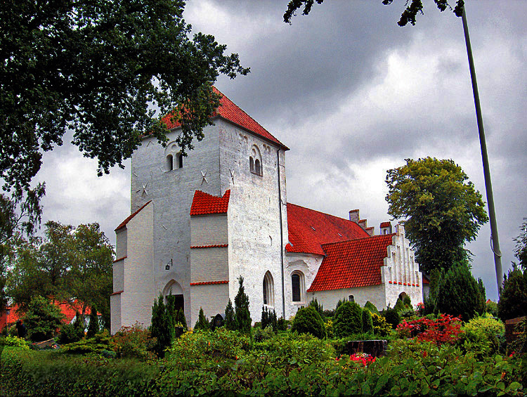 fra sydvest